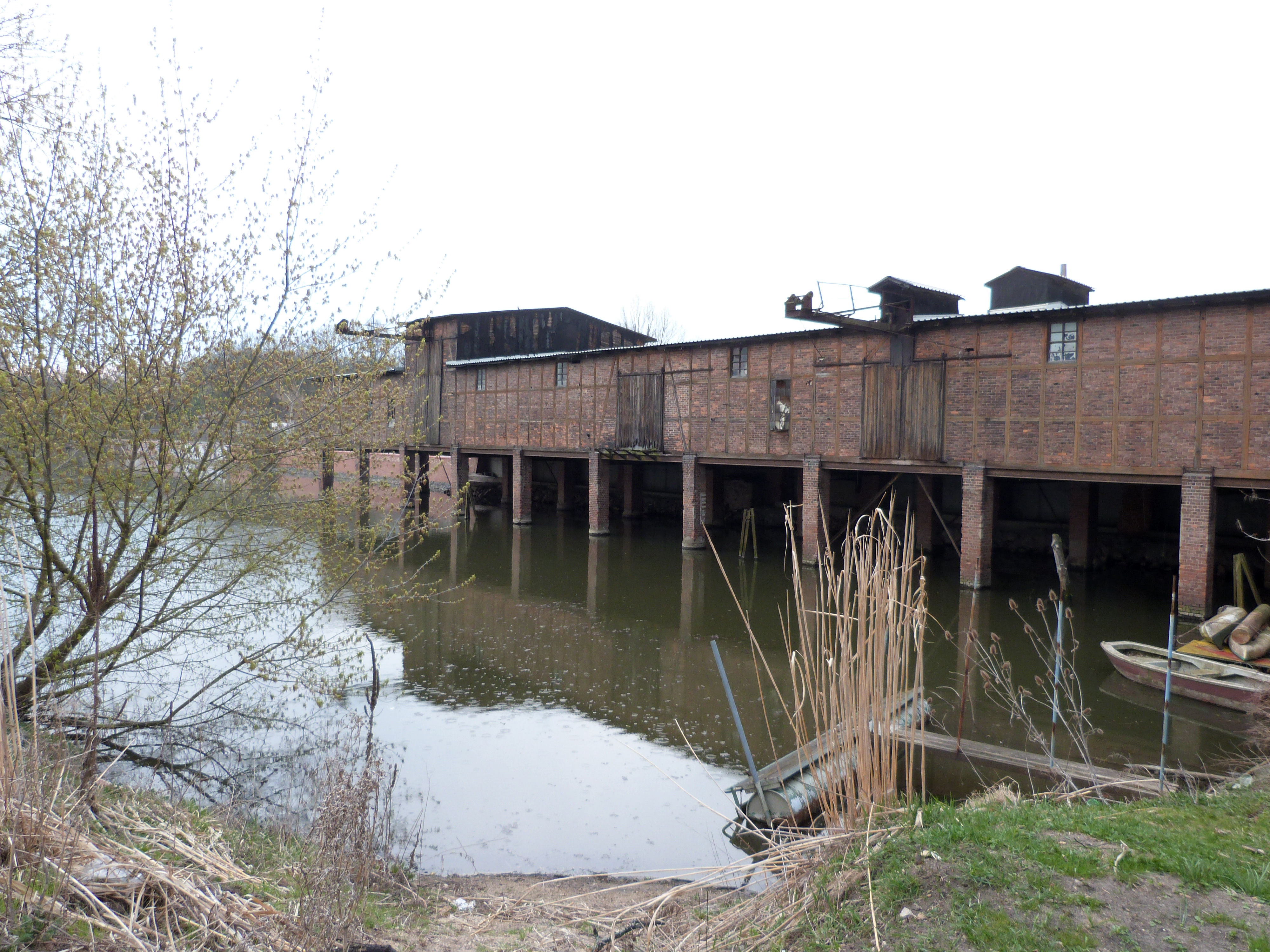 Sophienhafen Halle (Saale), ehemaliges Lager- und Verladegebäude